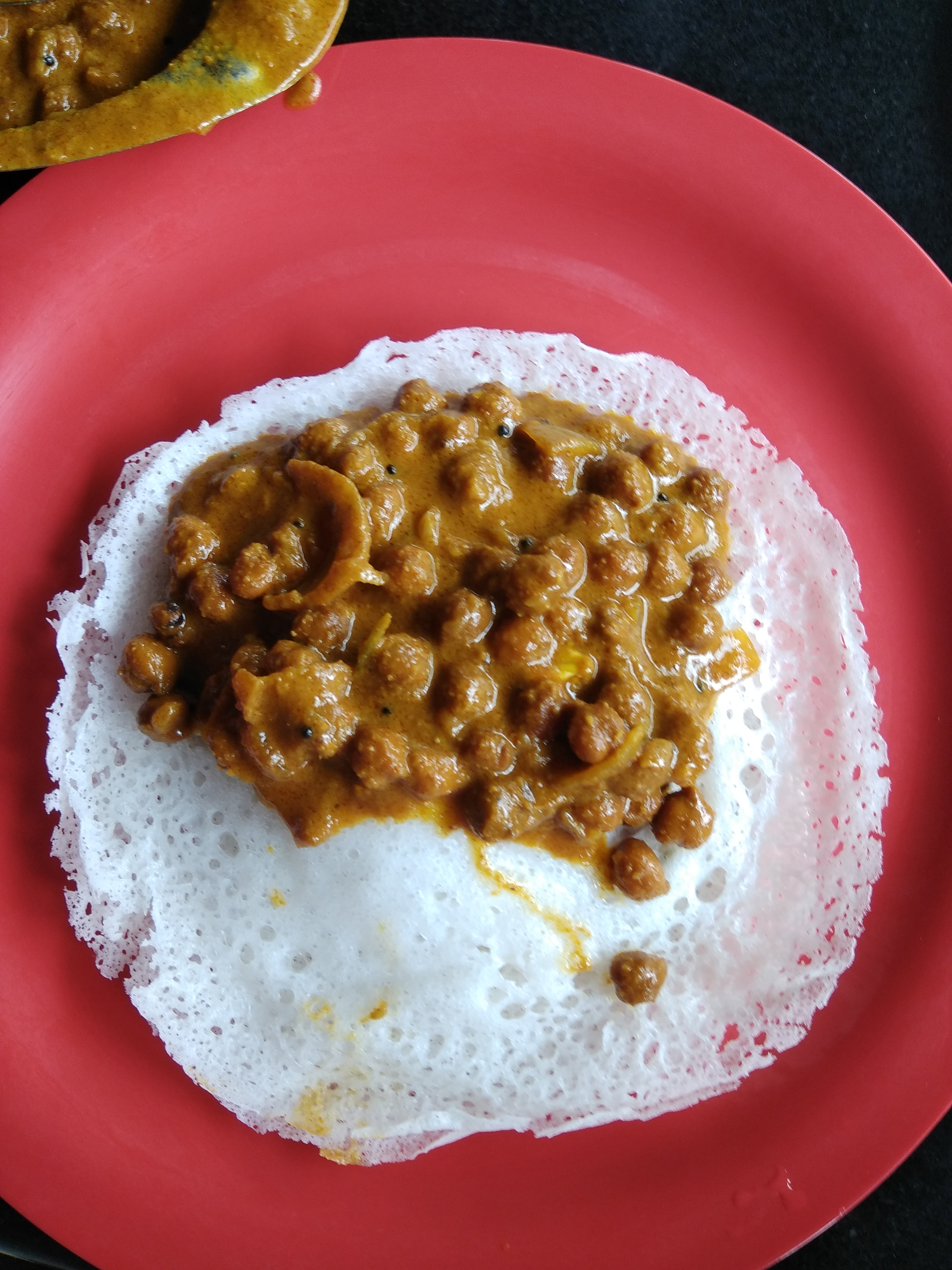 appam with kadala curry from kerala